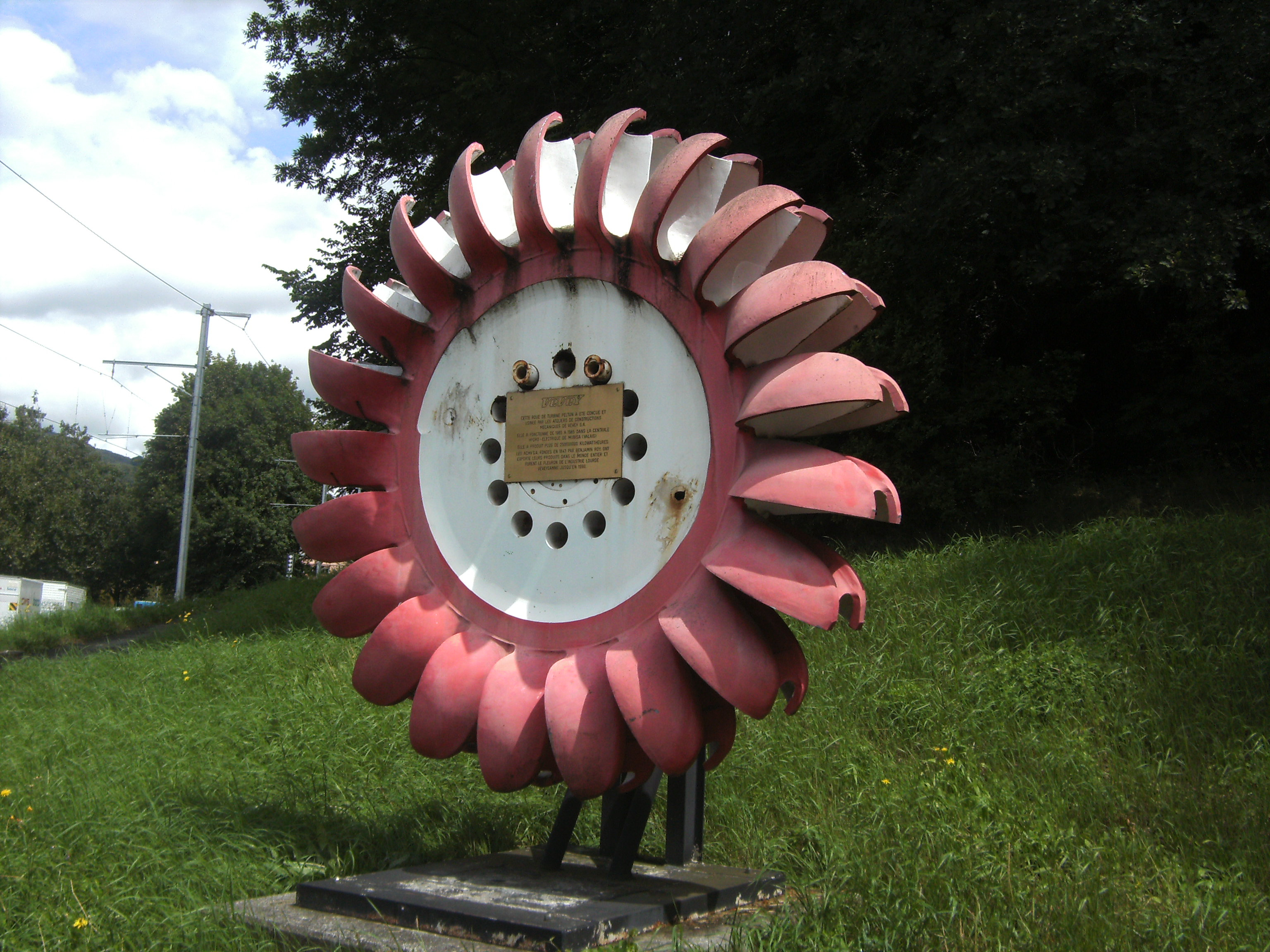 Vevey (Suisse) - roue de turbine Pelton usinée par les Ateliers de Constructions mécaniques de Vevey.